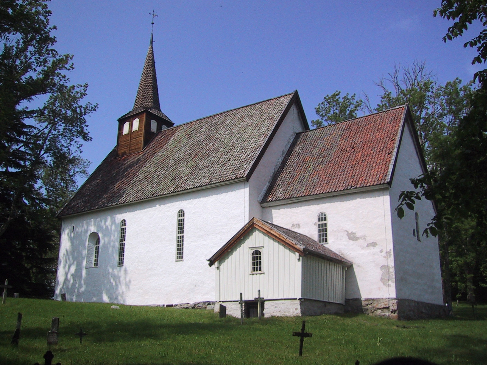 Gamle Veøy kyrkje sett frå søraust